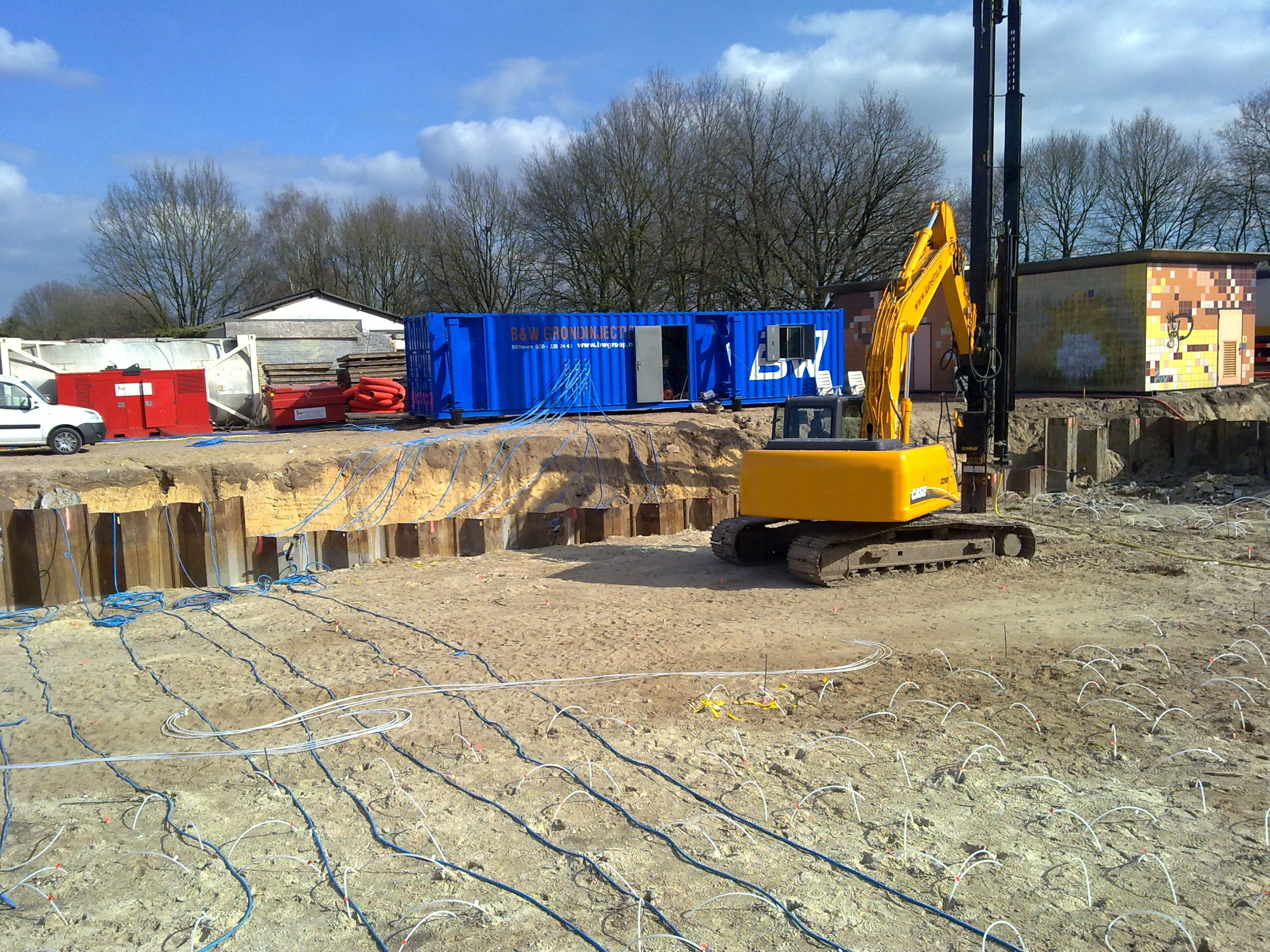 Horizontale grondinjectie in aanleg.